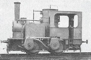 Dampfturbinenlokomotive von Berrluzzo gebaut 1908 von den Officine meccaniche Miani-Silvestri-Grondona-Comi, Mailand (Werksbild)